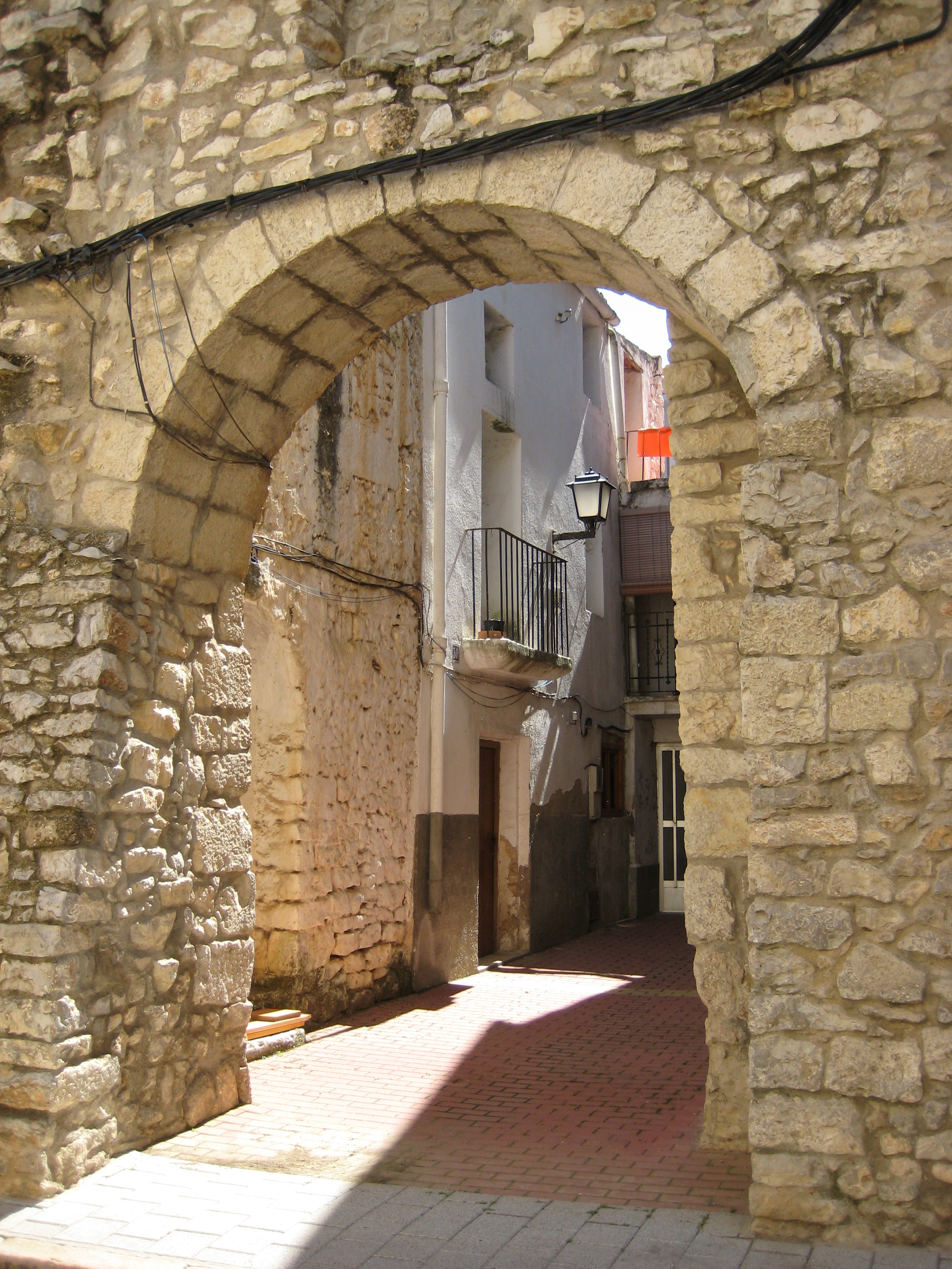 Portal de la Bassa o de Sant Mateu de La Salzadella (Baix Maestrat)